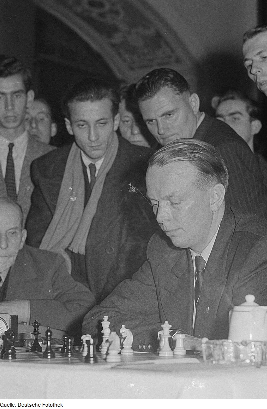 Original image description from the Deutsche Fotothek Schachspieler Otto Benkner aus Saarbrücken bei den Deutschen Schachmeisterschaften